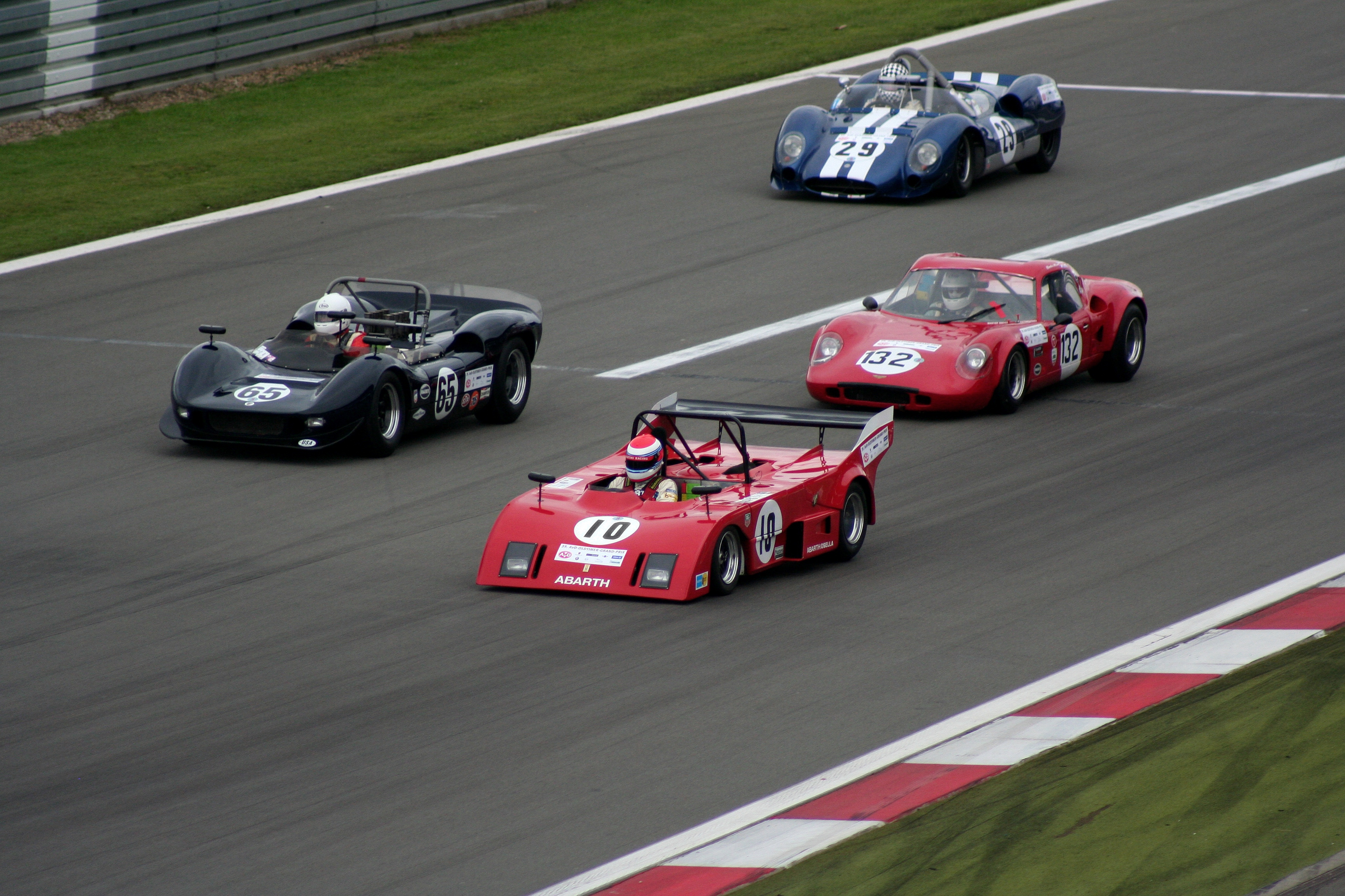 Lauf der World Sportscar Masters beim AvD-Oldtimer-Grand-Prix 2011. Nr. 10 Abarth Osella PA 1, Baujahr 1973, Nr. 65 McLaren M1 B, Baujahr 1966, Nr. 132 Chevron B8, Baujahr 1968, Nr. 29 Cooper Monaco, Baujahr 1963